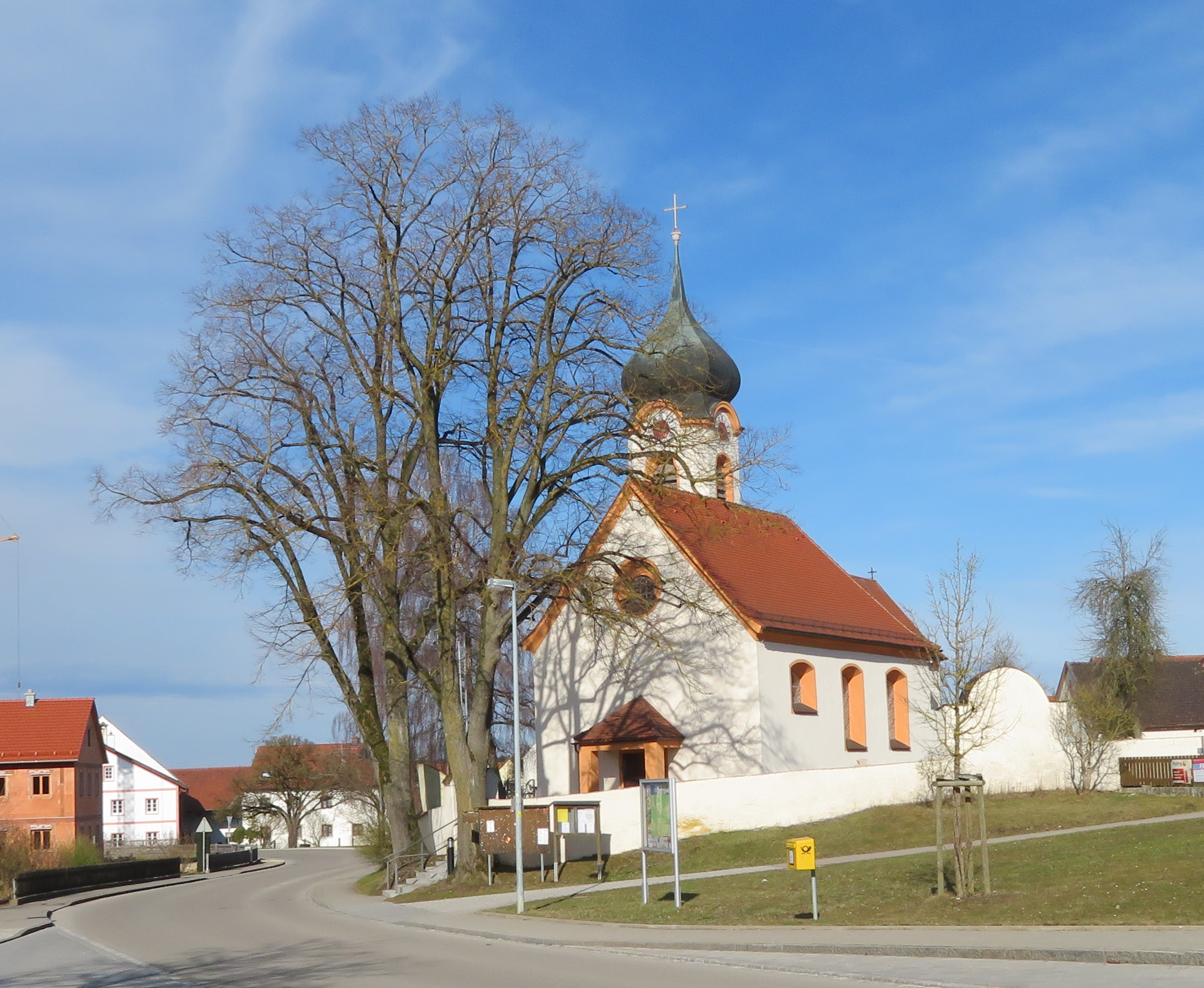 Biesenhard